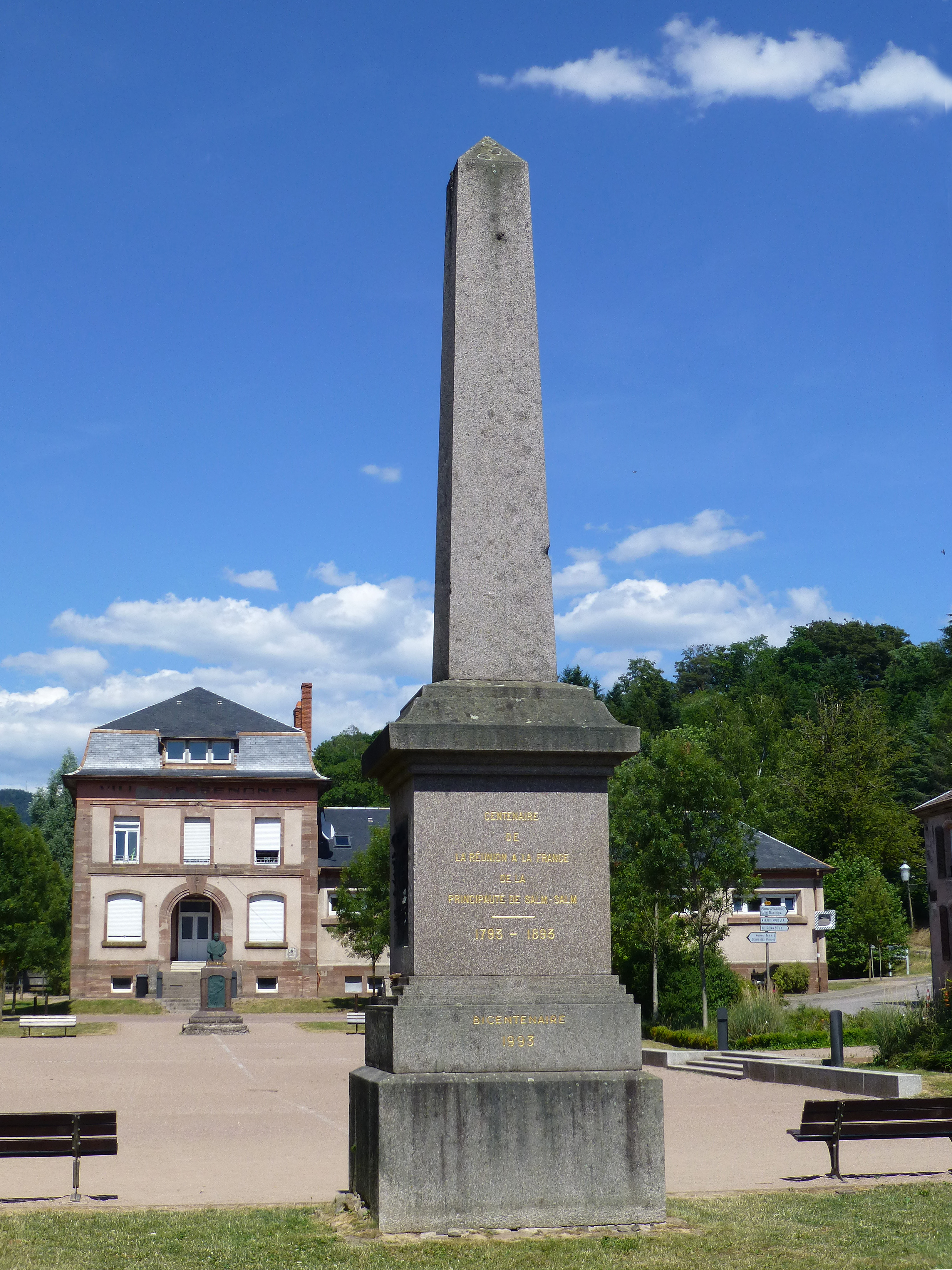 Senones (Vosges) : monument de 1893 commémorant le centenaire du rattachement de la principauté de Salm à la France